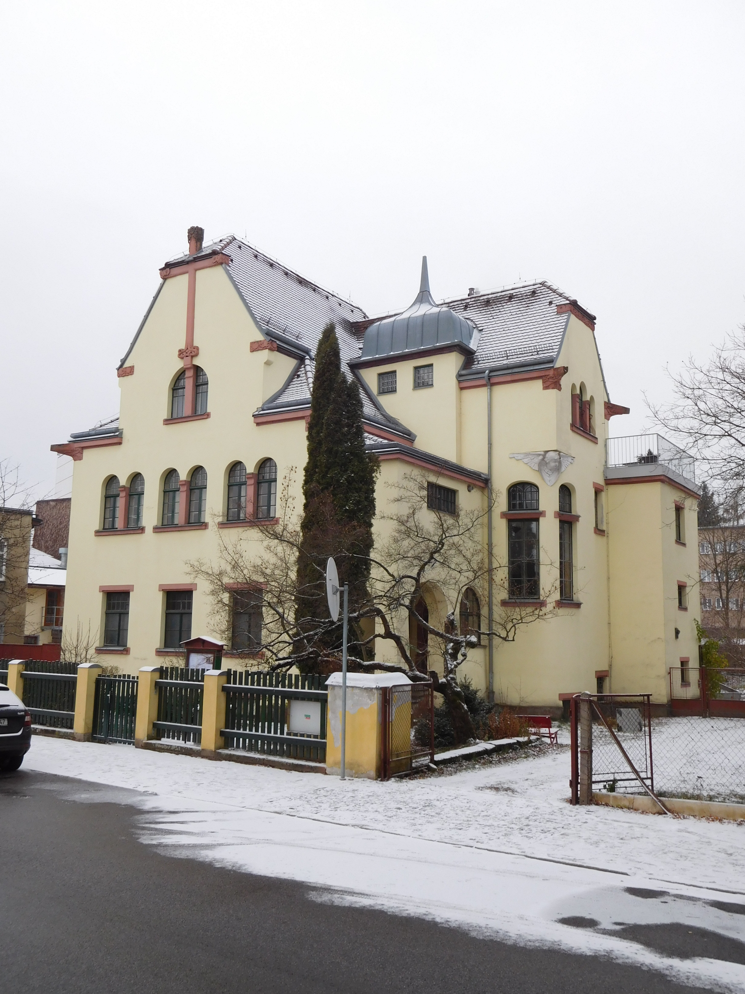 Vrchlabí - Českých bratří 112, Sbor ČCE